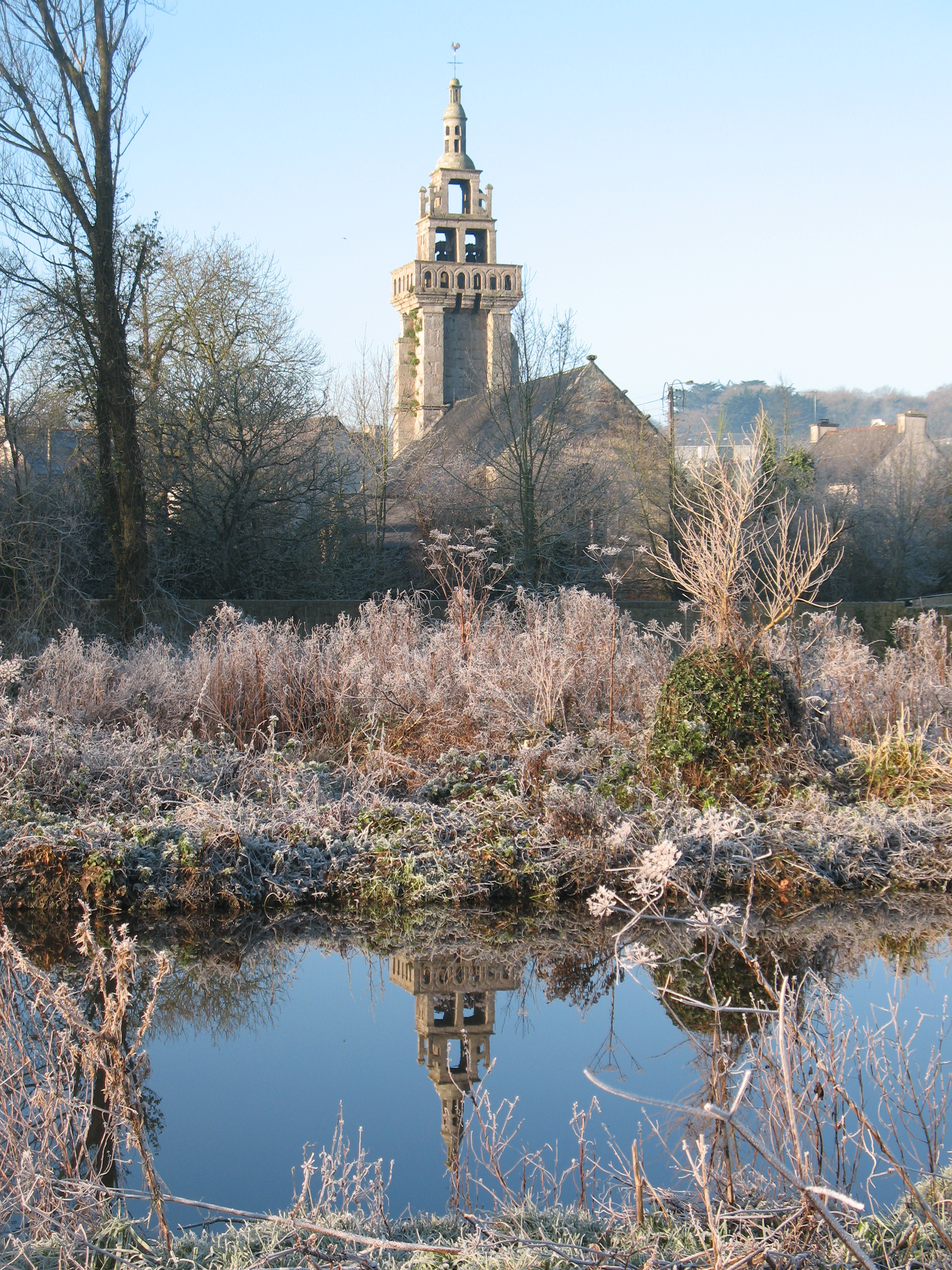 Plouider - Pont-du-Châtel - Chapelle St Fiacre - Effet Miroir sur rivière "La Flèche"